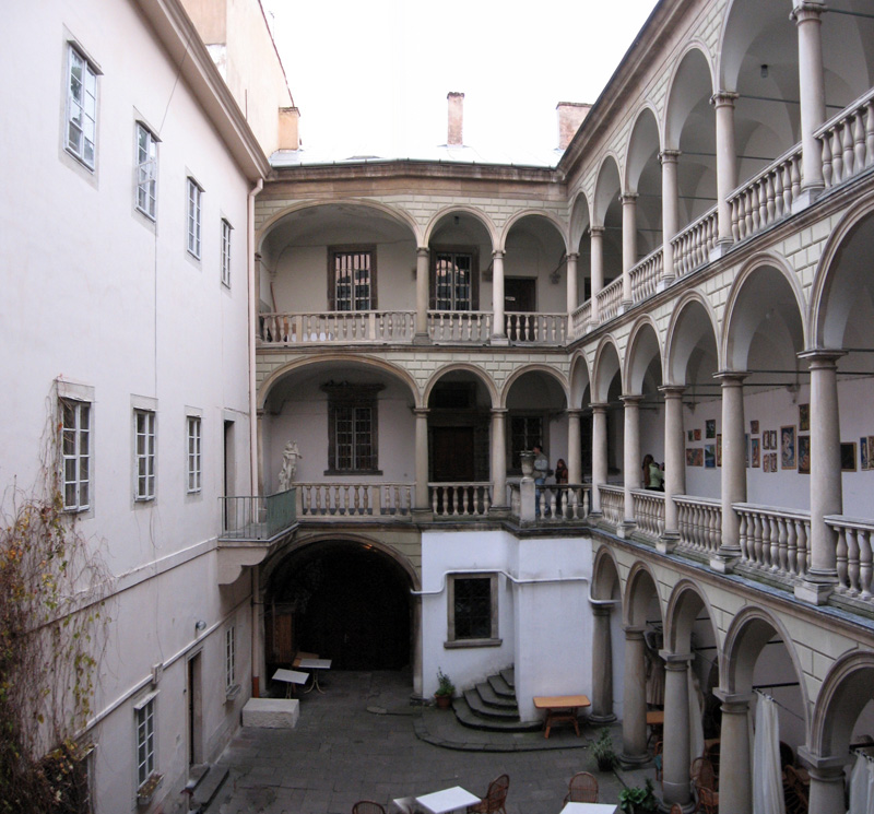 Korniakt Palace